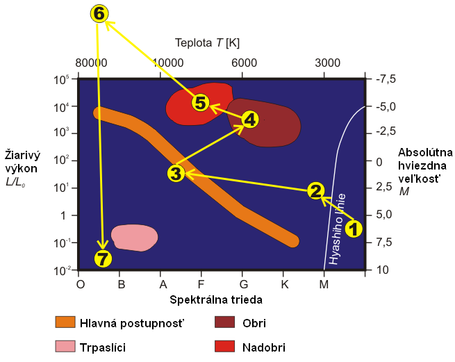 Slovenská verzia súboru Soubor:HR-diagram 02.png. Vývoj hviezd stredných hmotností na Hertzsprungovom Russelovom diagrame